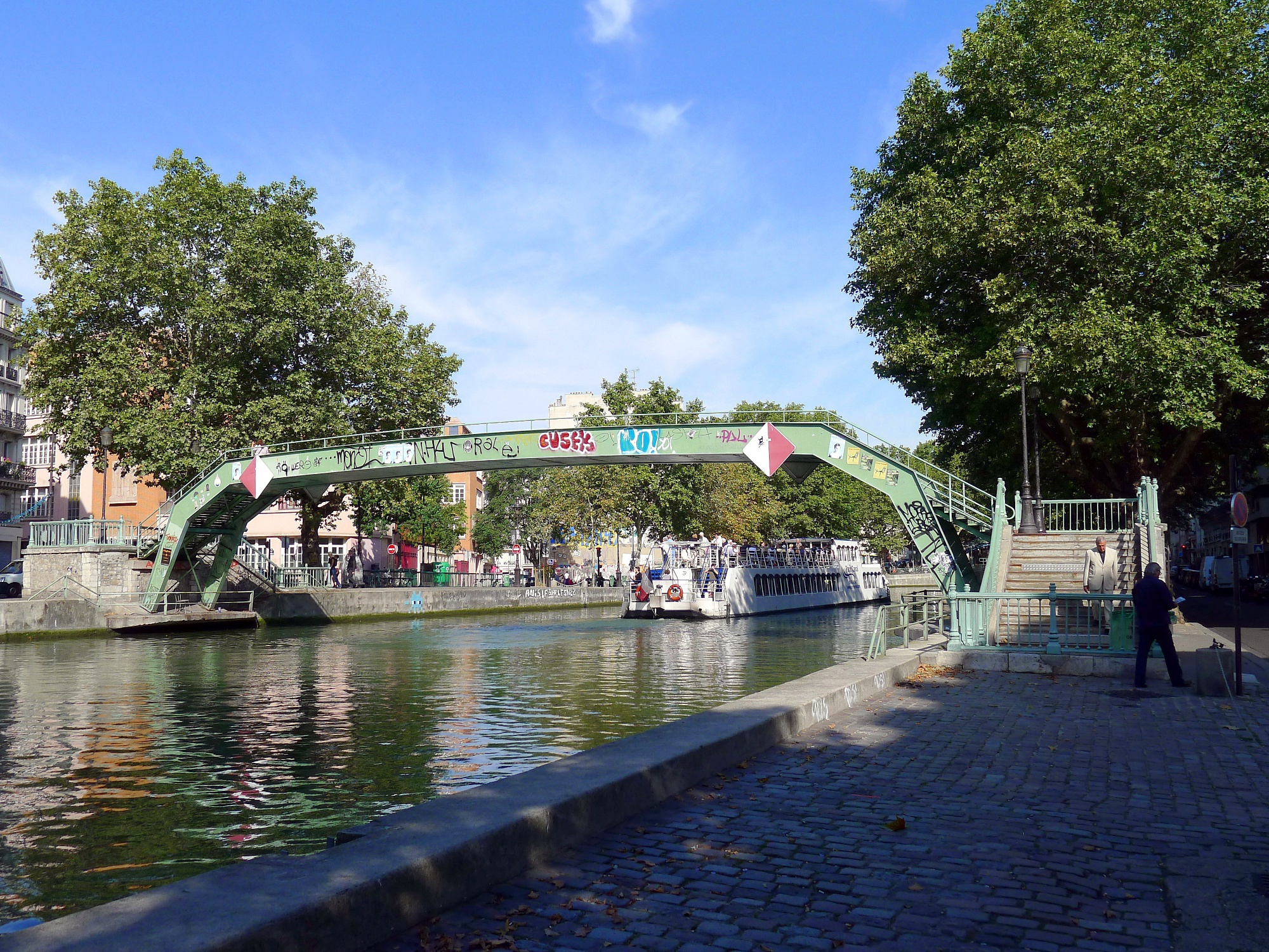 Canal Saint-Martin et passerelle de la Garnge-aux-Belles vus du quai de Valmy - Paris X